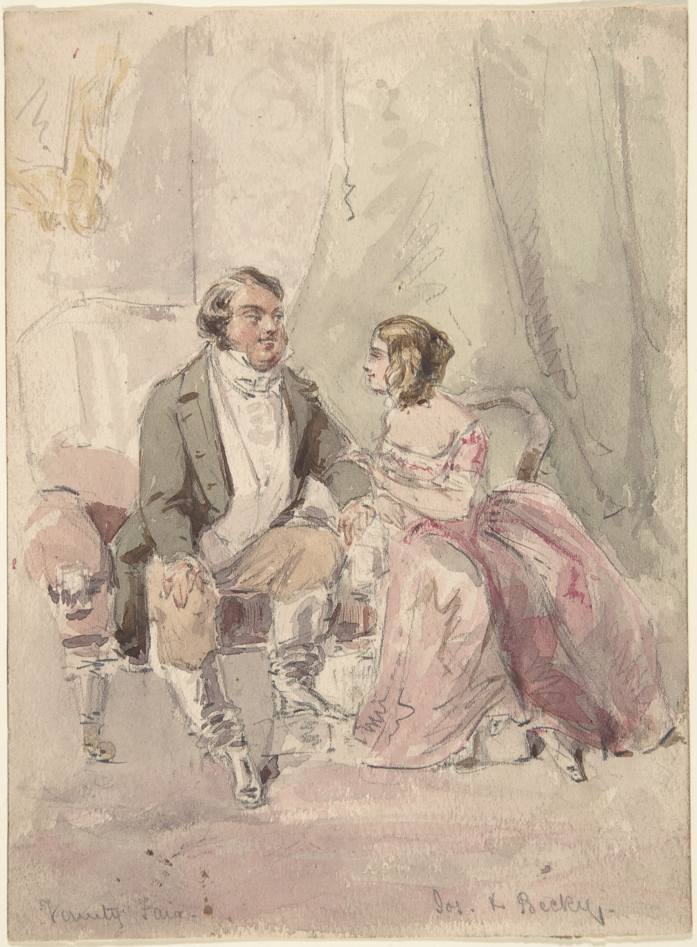 Drawing; Drawings